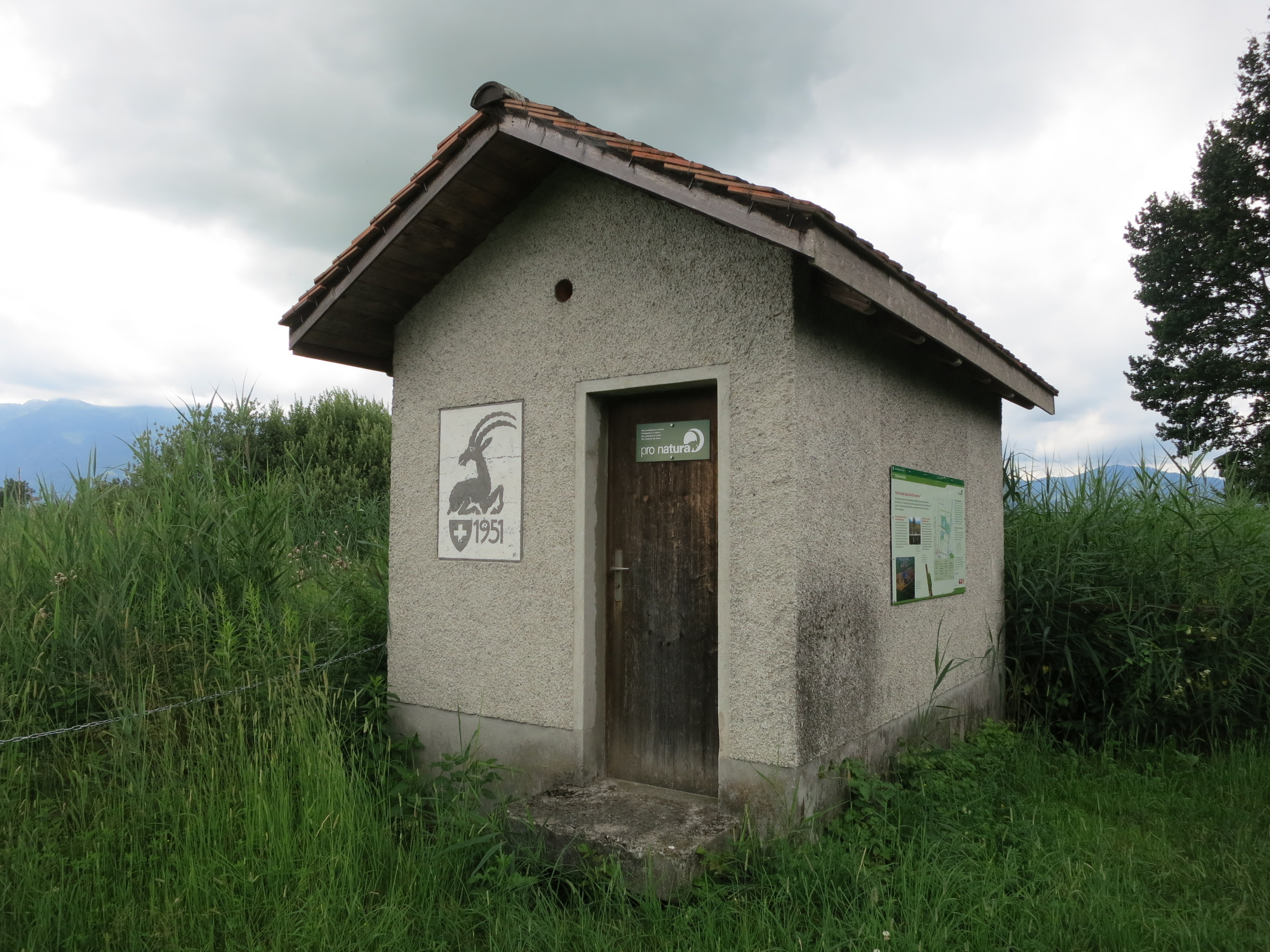 Kaltbrunner Riet, Linthebene, Schweiz